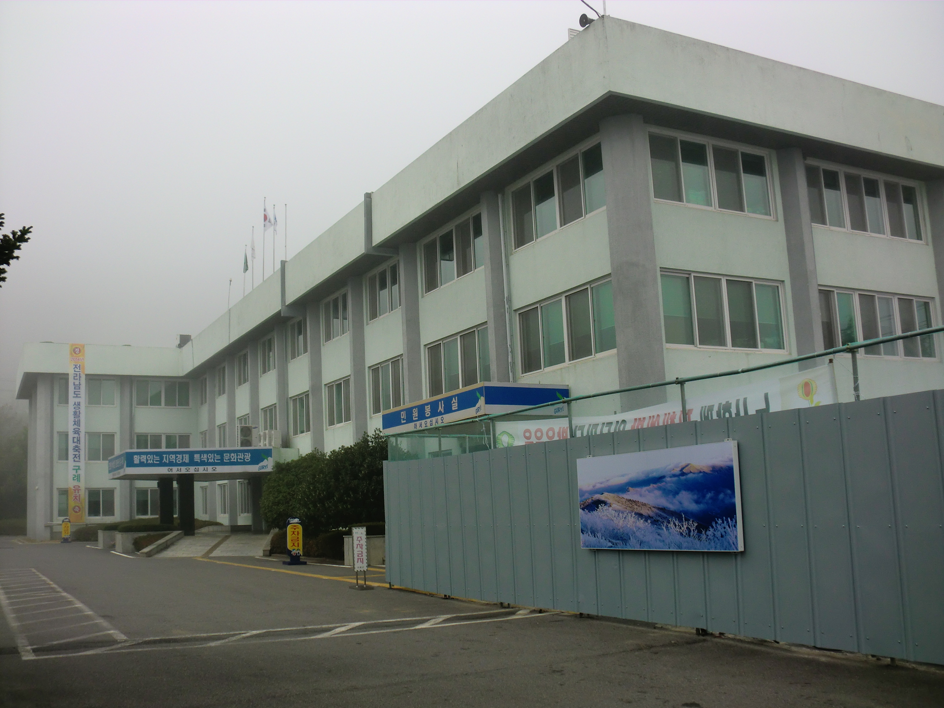 전라남도 구례군에 있는 구례군청